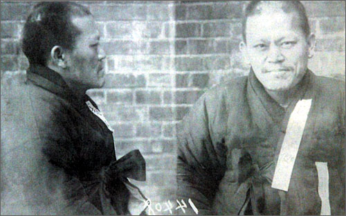 조병옥, 1929년 겨울, 서대문형무소에서